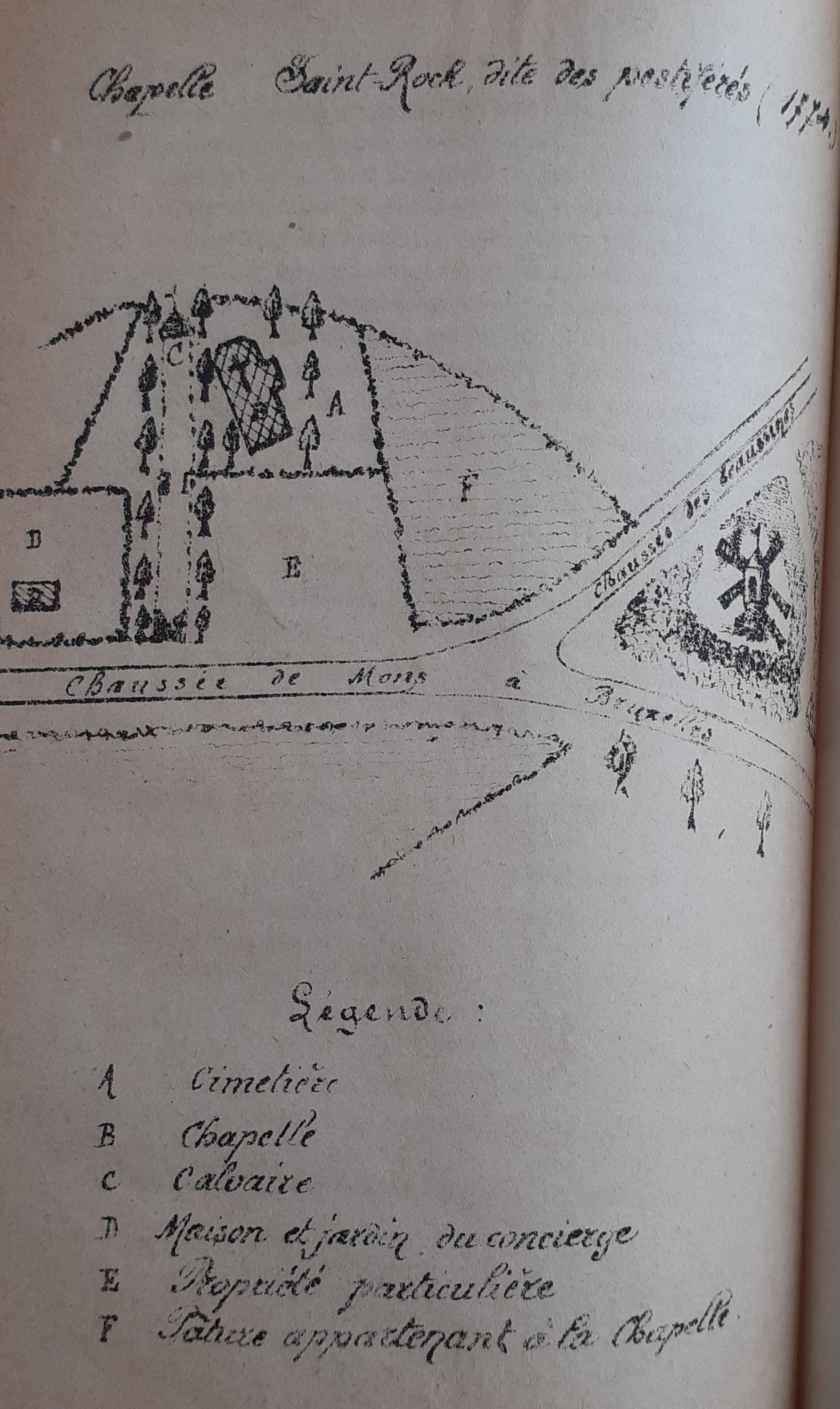 Plan du XVIIIe siècle publié dans La paroisse de Braine en 1889.